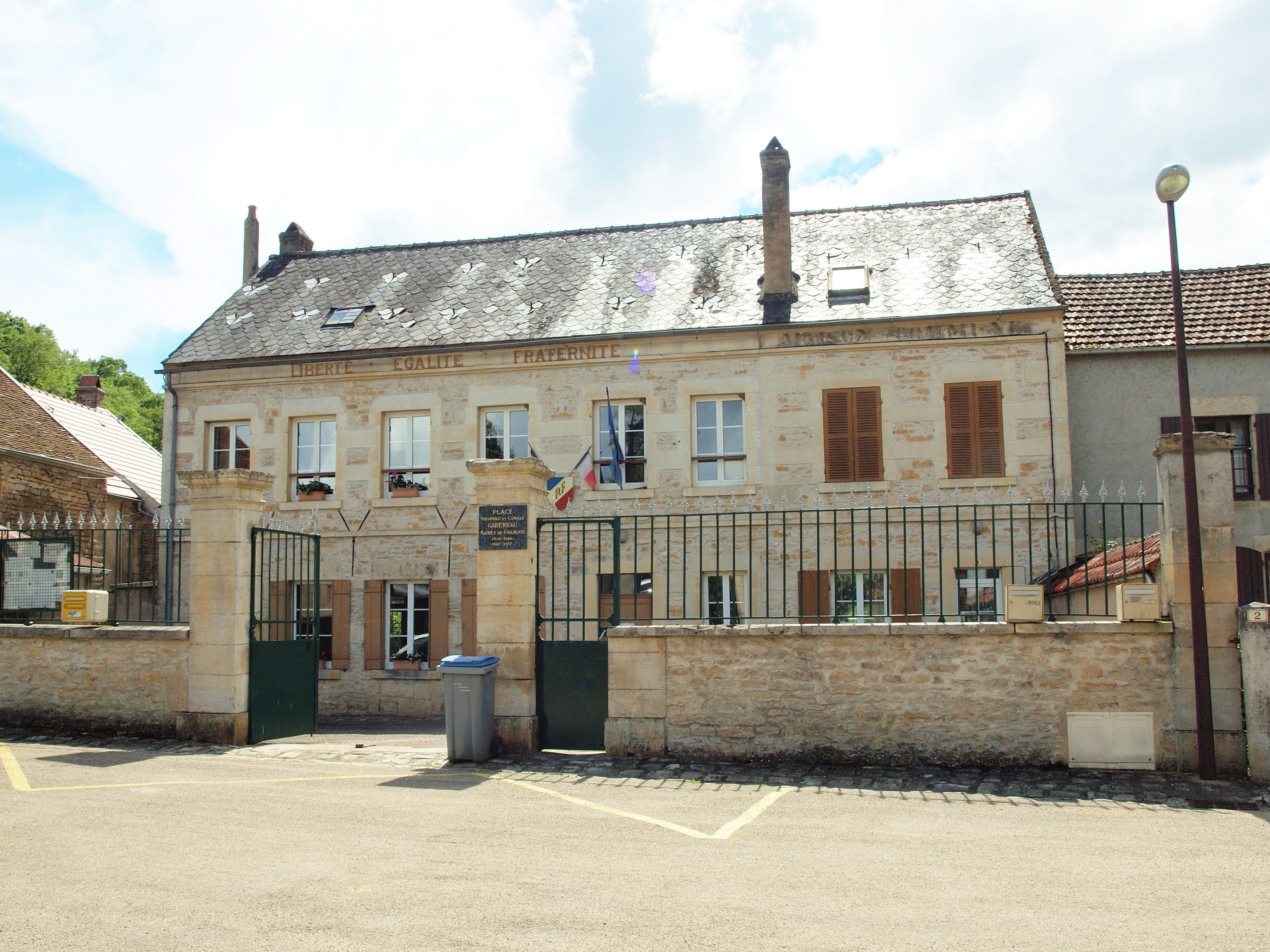 Chamoux (Yonne, France)